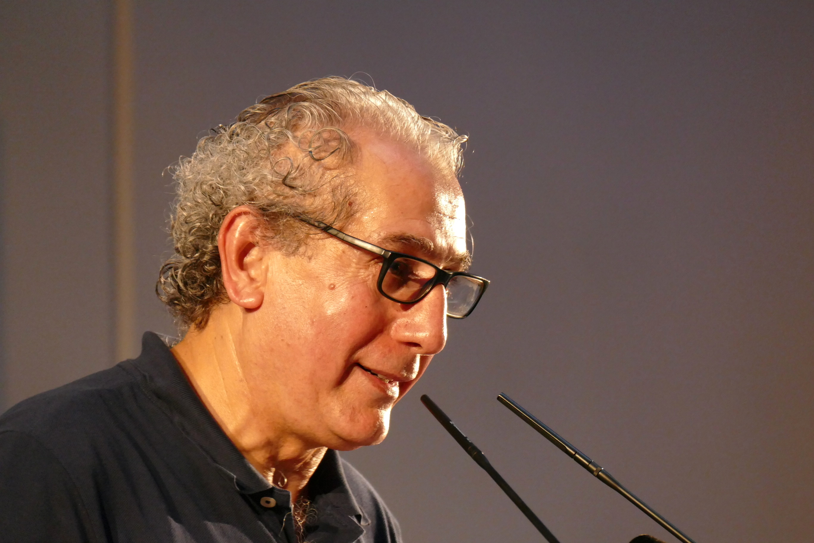 Imad Karim bei einer AfD-Informationsveranstaltung - Schriesheim, 22.7.2017